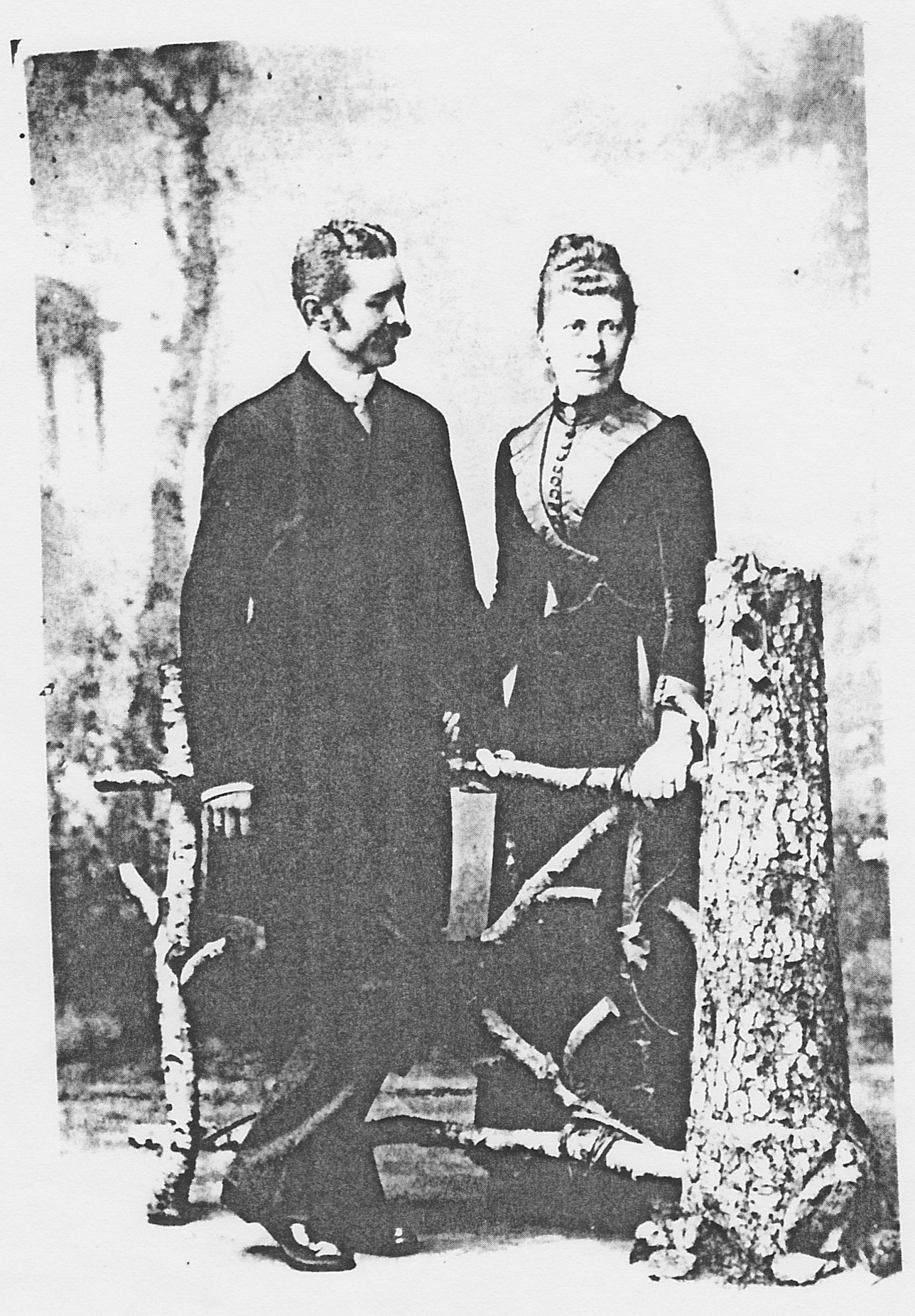 Baron Jozef E.W.H. d'Olne(Olne IV)(1848-1890) met tweede echtgenote Barones Maria,Johanna,Theresia,Josepha,Huberta,Barones de Weichs de Wenne(1851 - 1930)